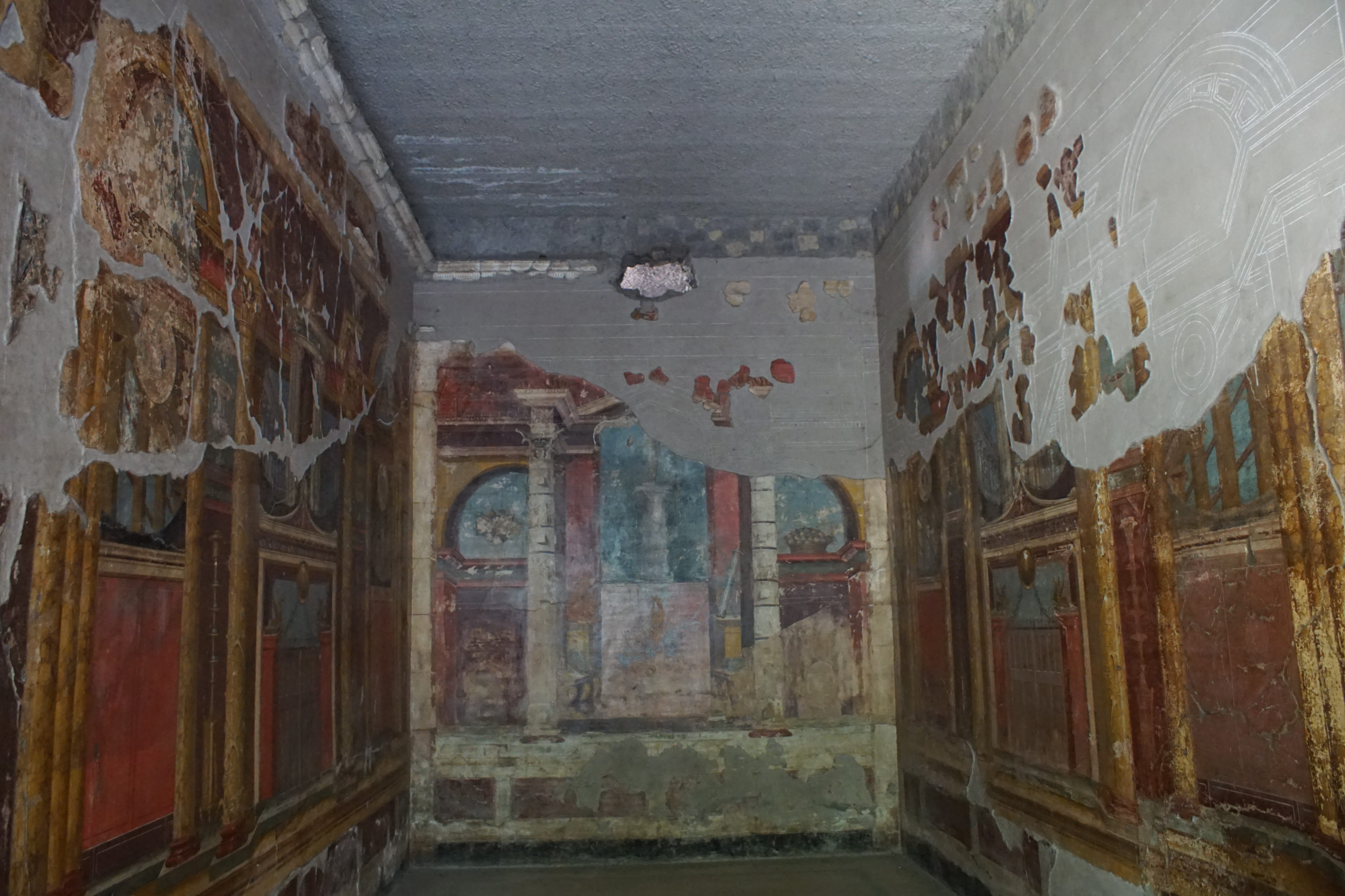 Villa di Poppea, Oplonti - MIBAC This is a photo of a monument which is part of cultural heritage of Italy.